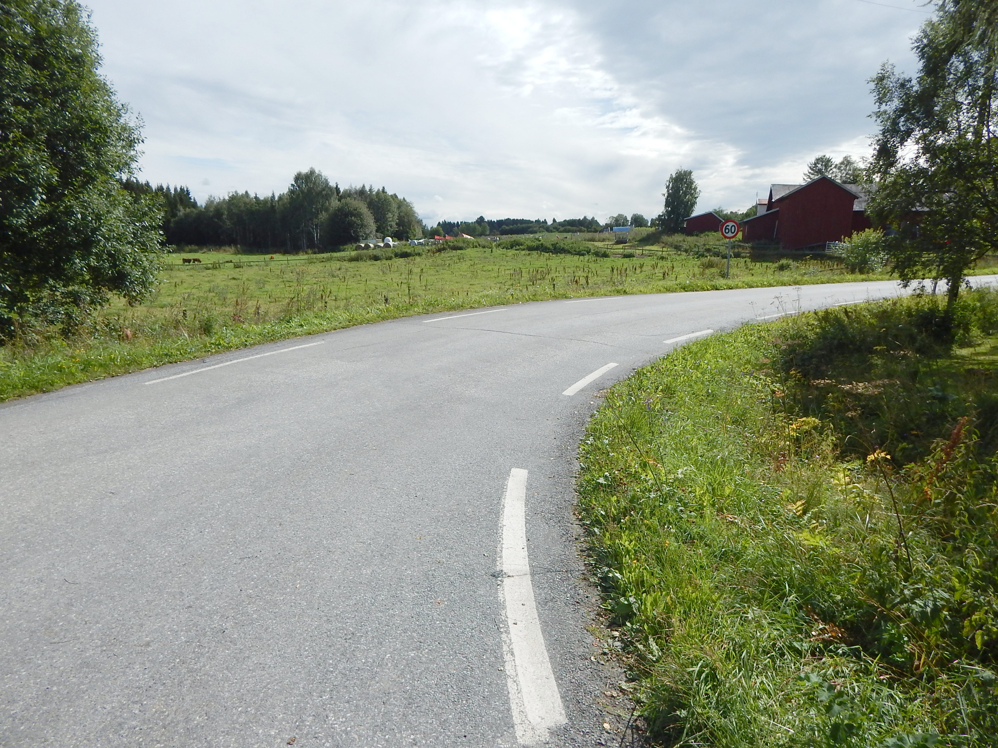 Smågardsvegen (fylkesvei 2374, tidl. 113) nær enden mot Børsvollvegen (fylkesvei 2370)